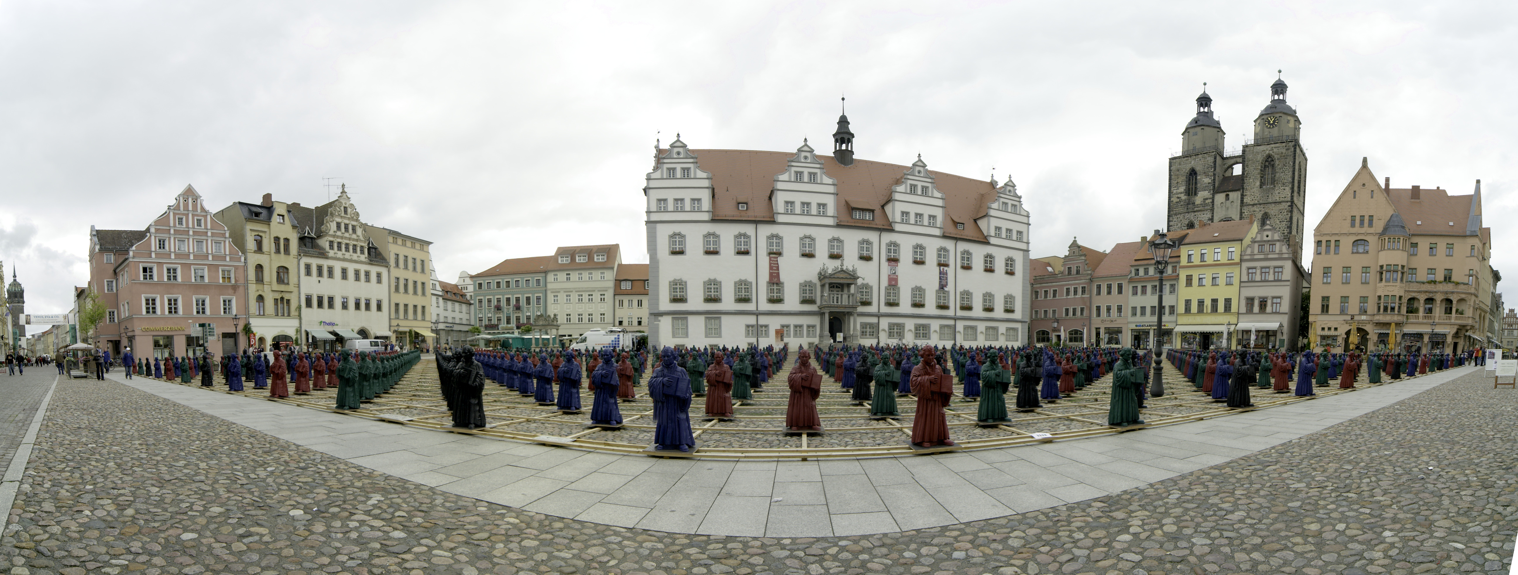 Installation von 800 Lutherfiguren auf dem Wittenberger Marktplatz von Ottmar Hörl.